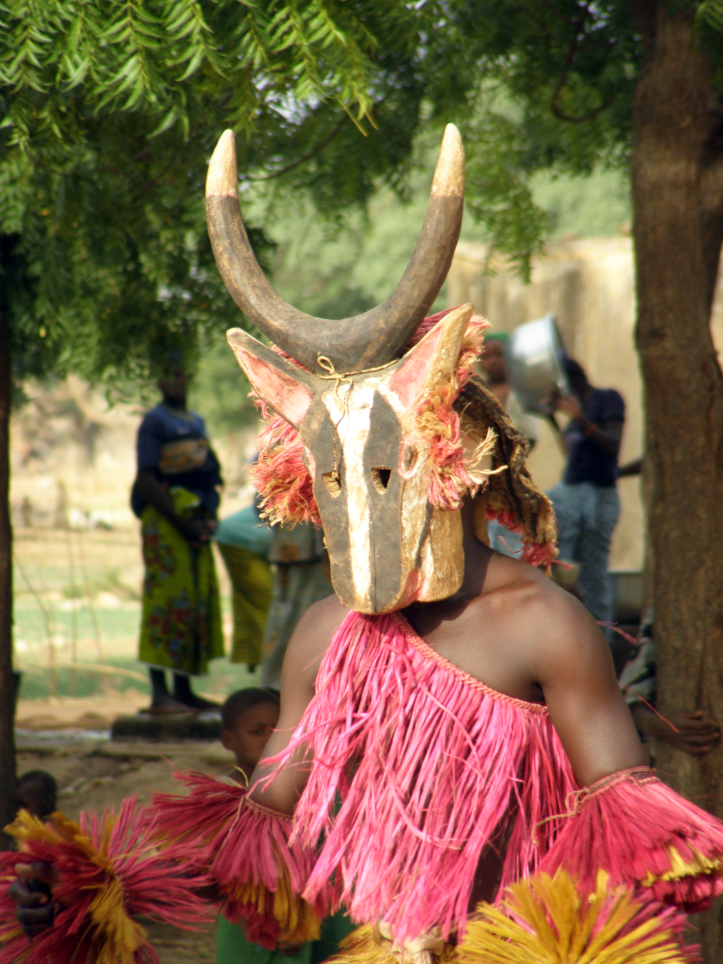 Masque Dogon - Vache - Village de Sangha - Mali